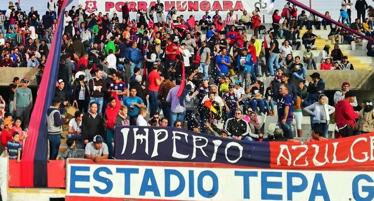 Porra Hungara Imperio Azulgrana